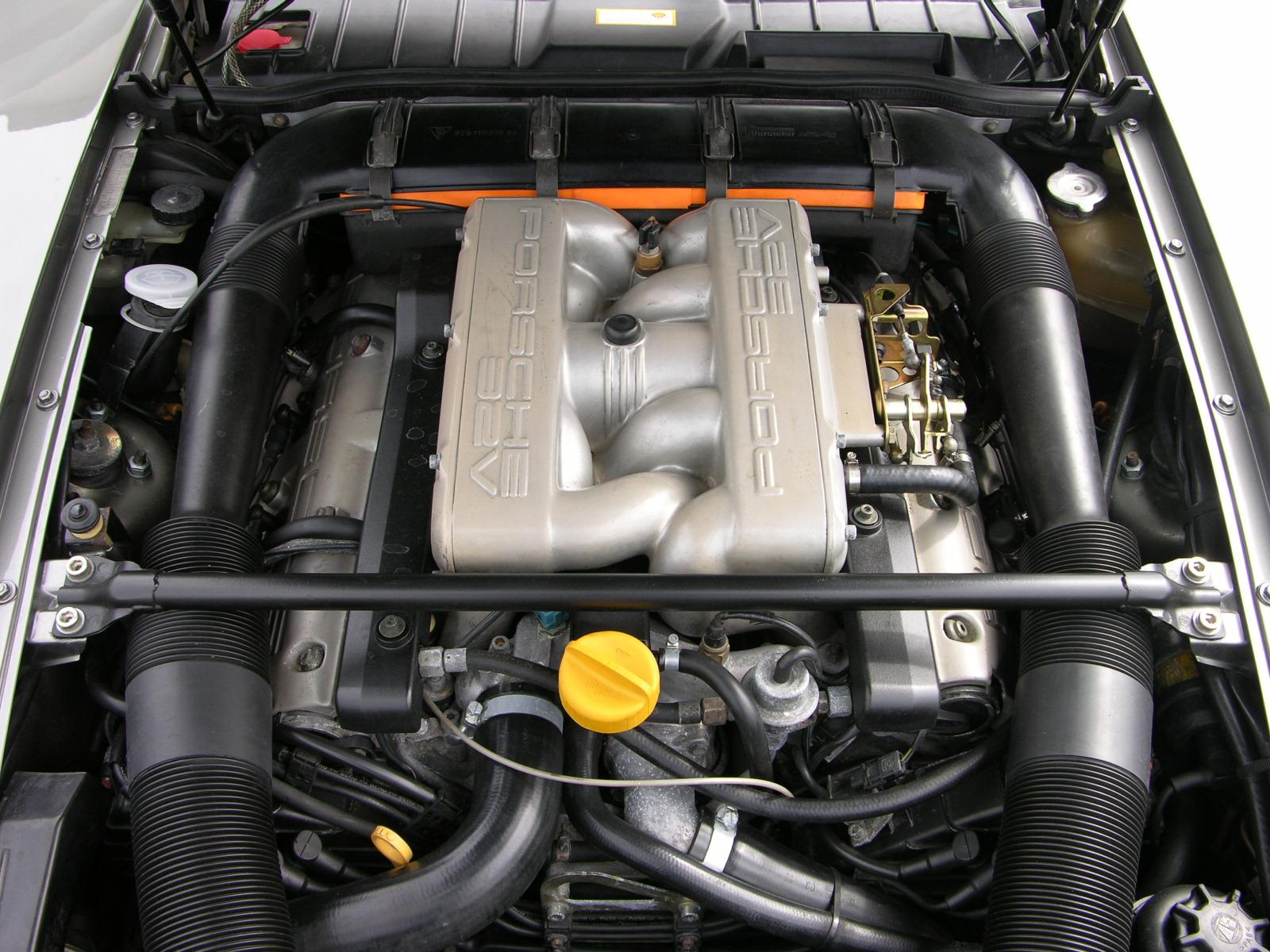 1987 Porsche 928 S4 V8 engine